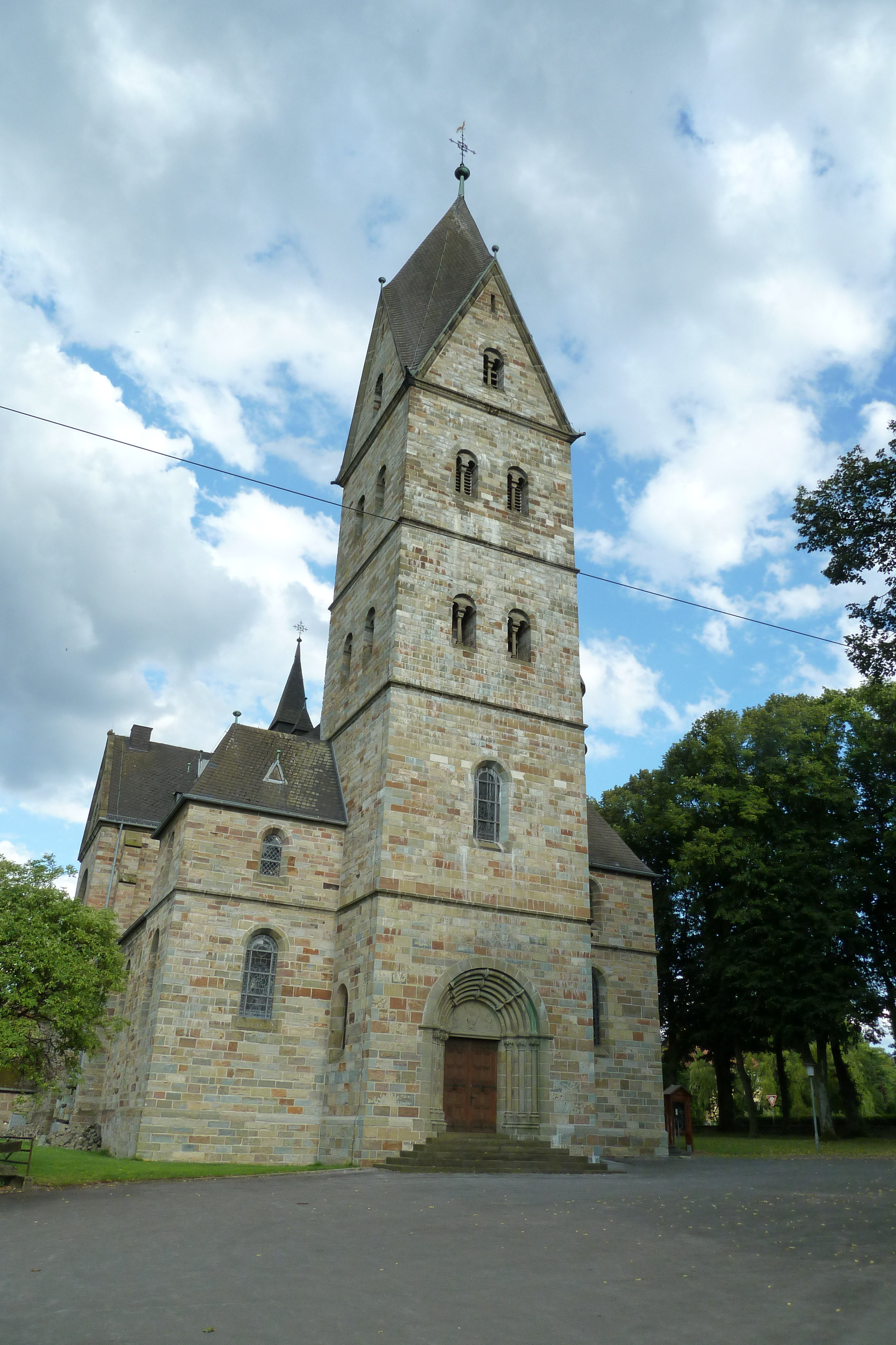 Die St.-Johannes-Baptist-Kirche in Rüthen-Langenstraße.